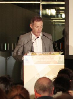 En el día más intenso del Foro compartimos muchas experiencias de educación para la paz. Aquí puedes ver una fotogalería y enlaces a crónicas que recogen todos los debates..